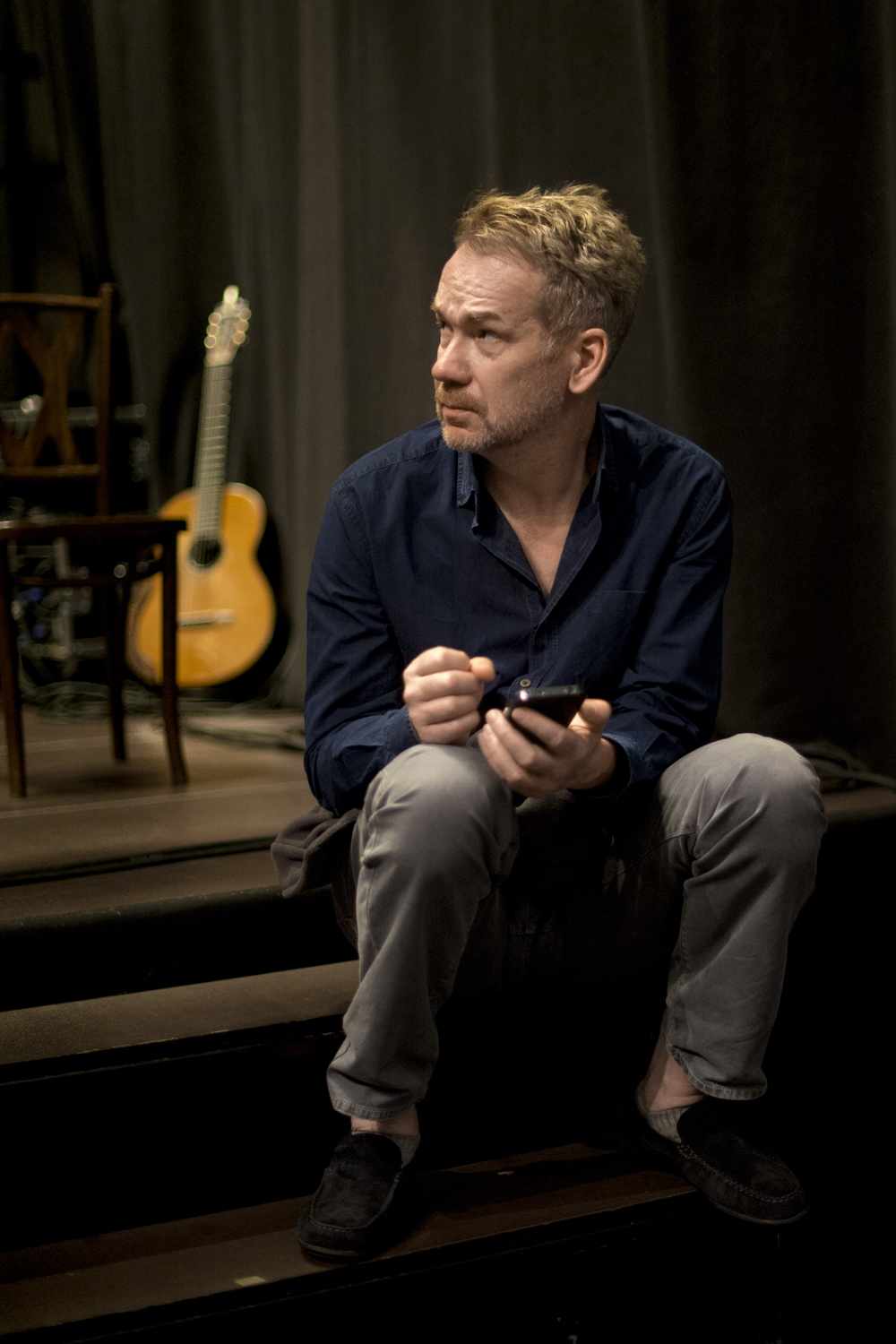 Mirosław Baka przed spektaklem w Lublinie w 2015r.